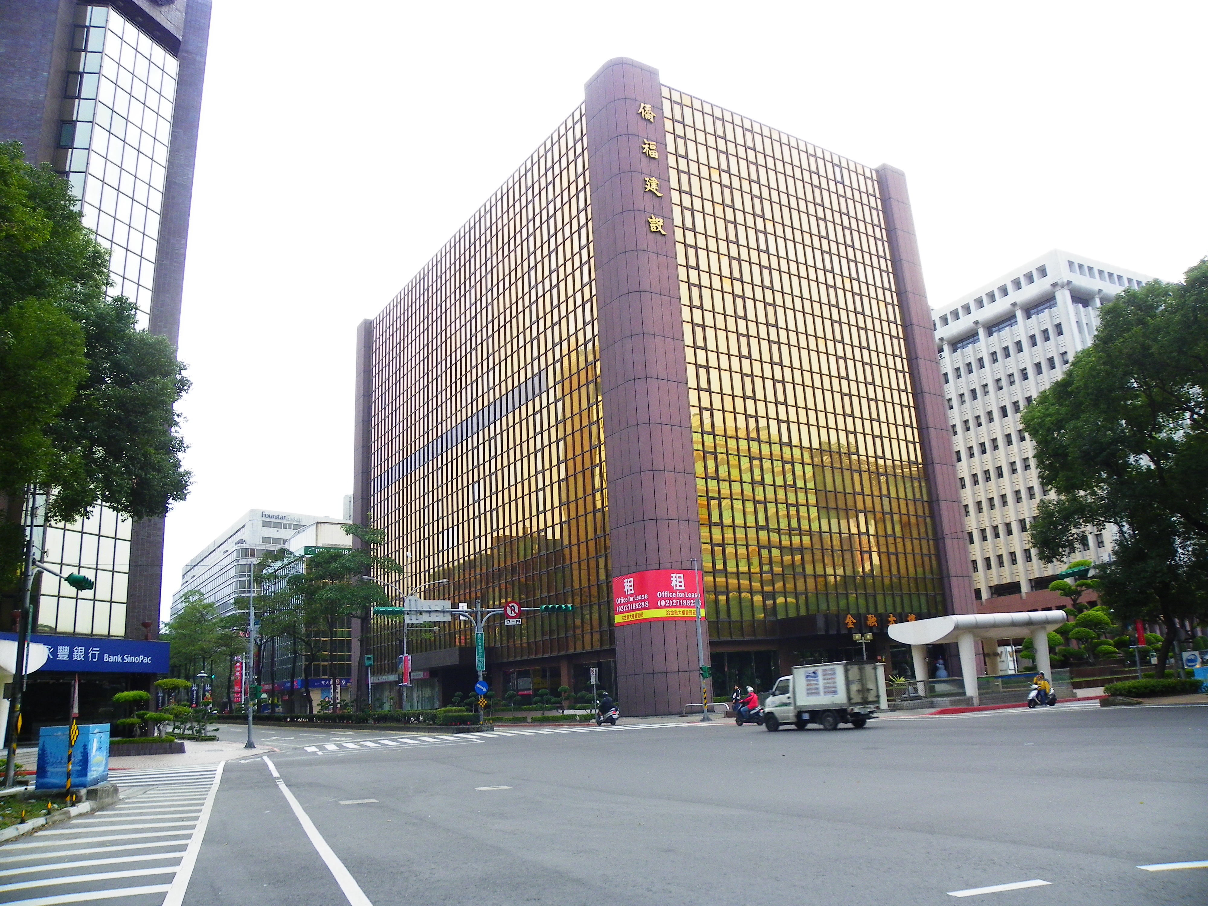 臺北市松山區敦化北路與民生東路四段路口的僑福建設金融大樓，民生社區西方主出入口的地標。